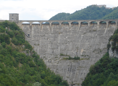 Panorama della diga del Salto dalla strada statale 578